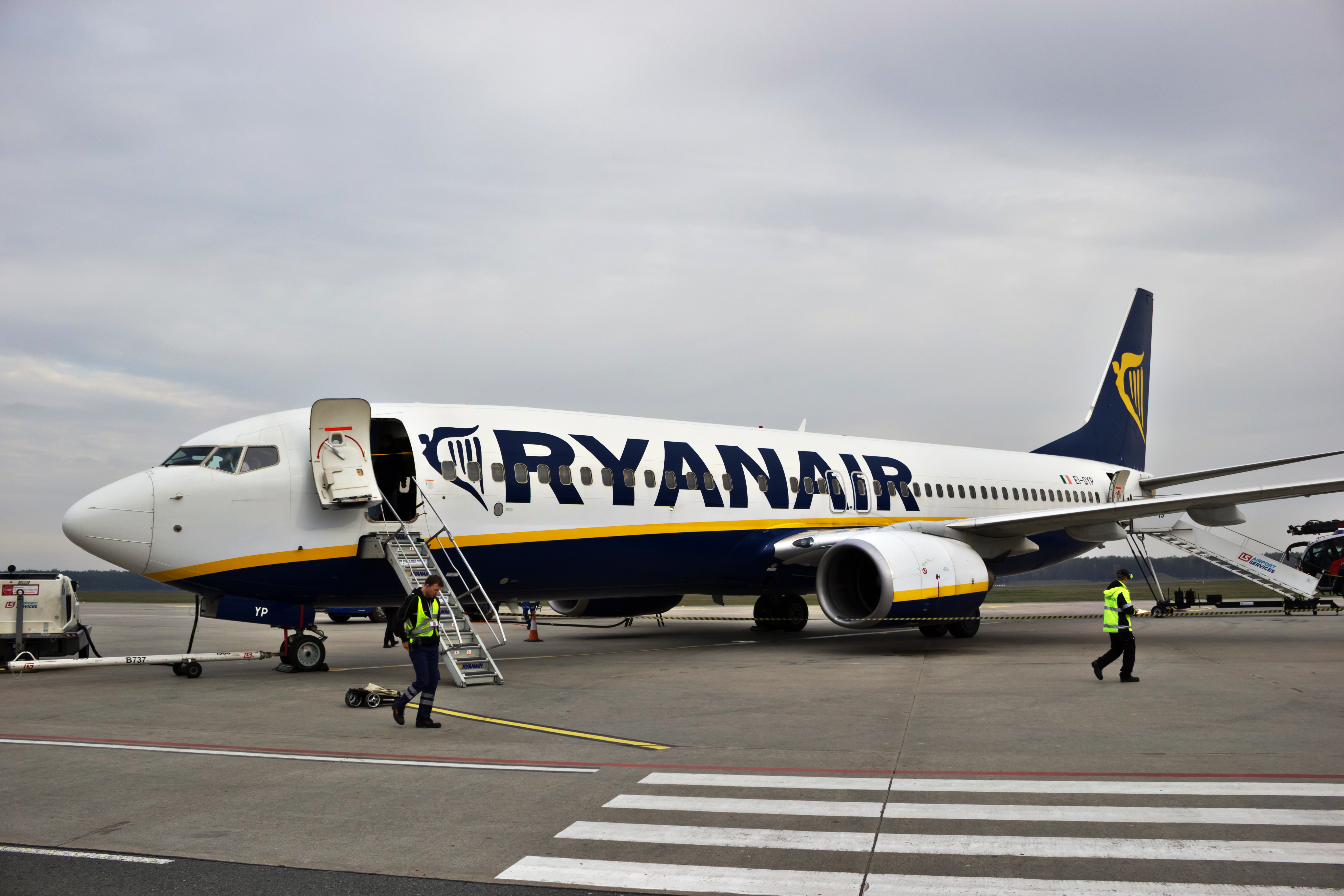 Boeing 737 de Ryanair no aeroporto de Modlin.